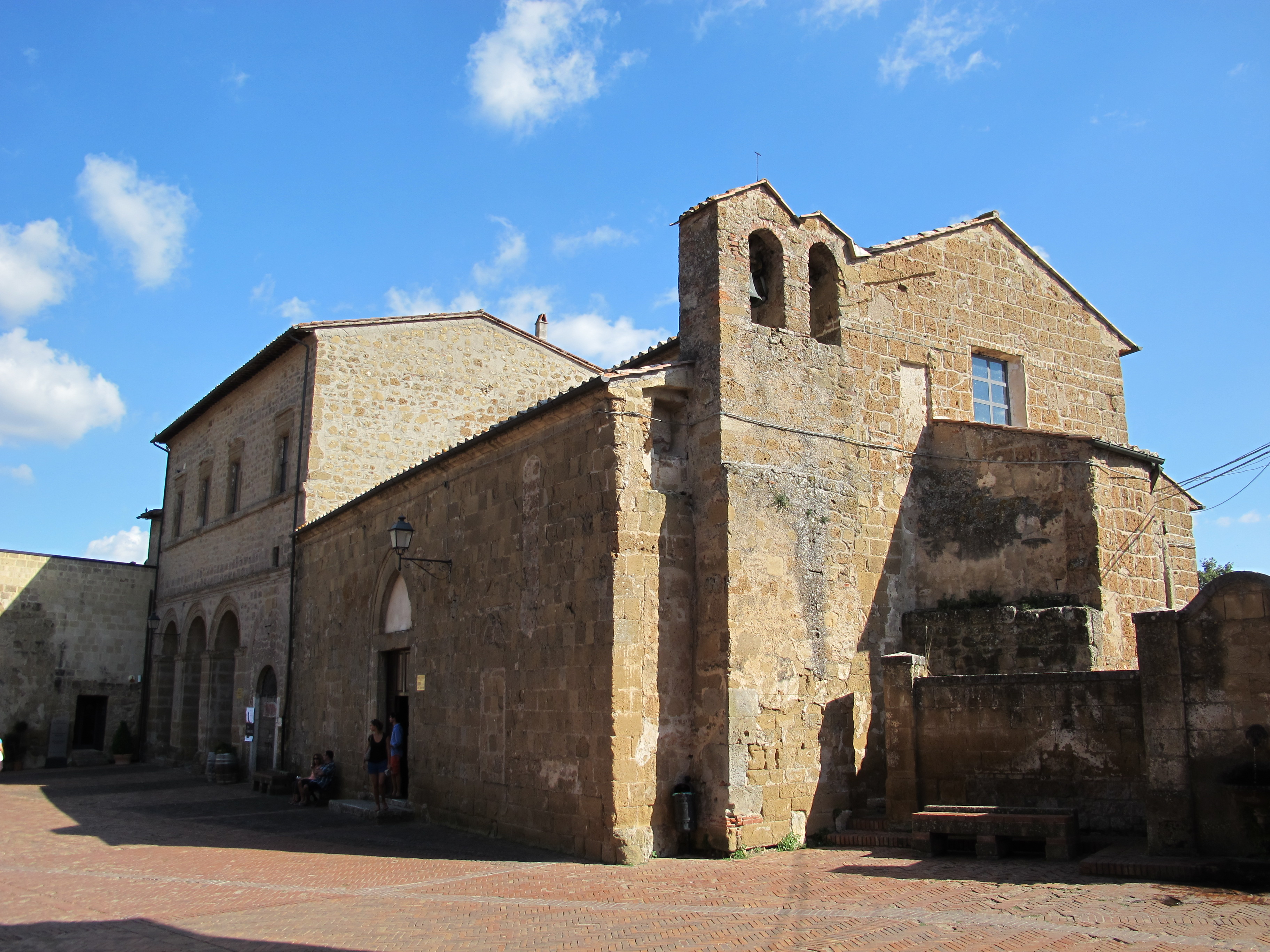 Sovana